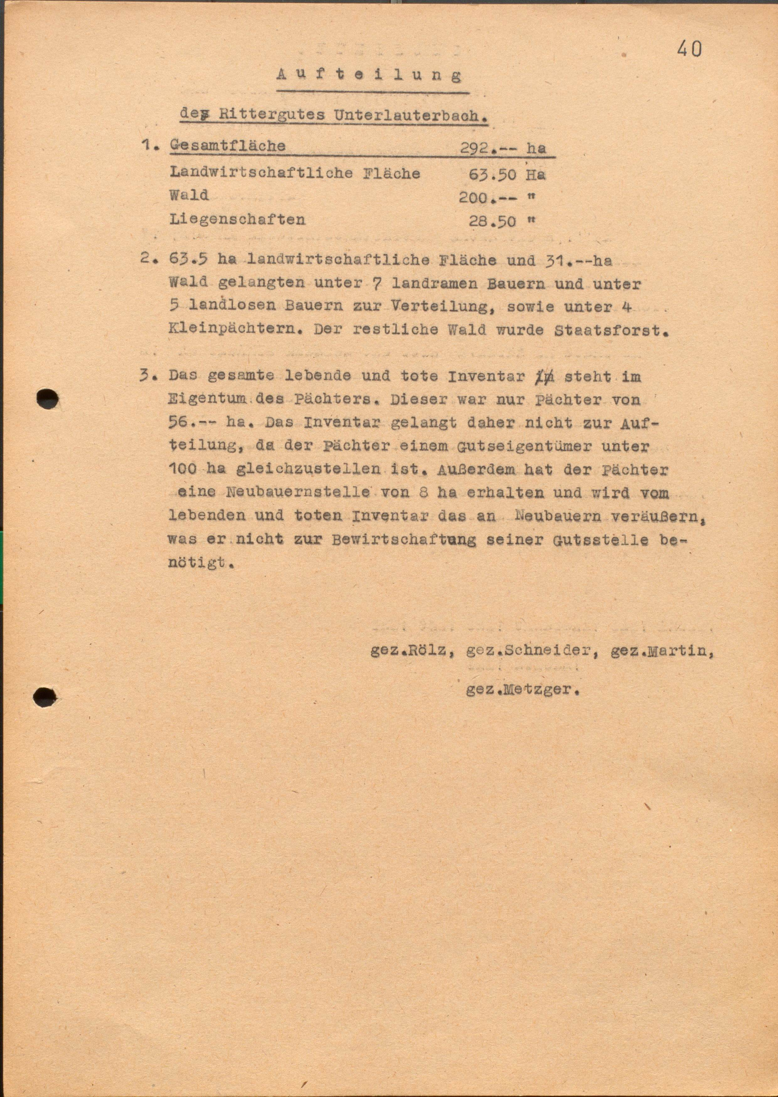 Aufteilung des Rittergutes Adlershof im Zuge der Bodenreform vom 01.04.1946, Datei aus Archiv (Az. 42-7512.20/14572)